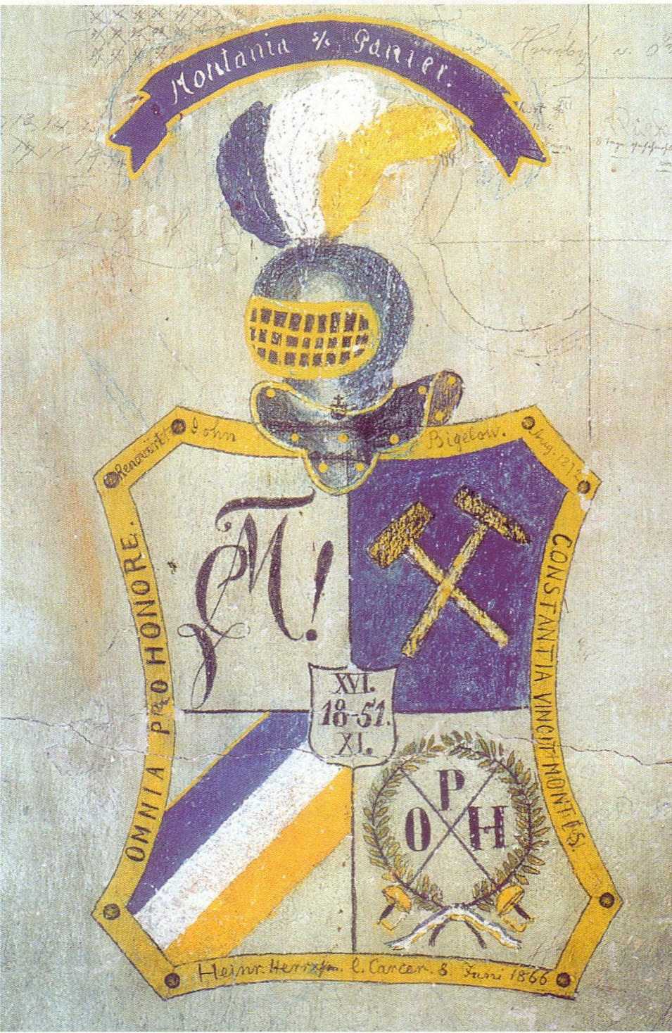 Wappen des Corps Montania Freiberg. Rekonstruktion aus dem Freiberger Karzer.